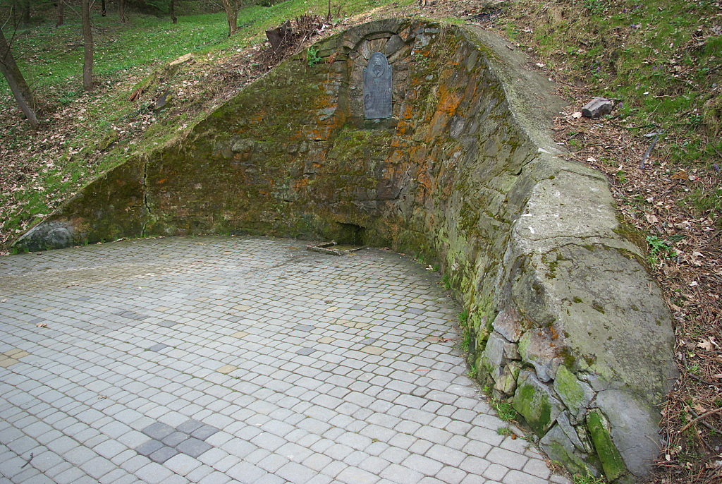 Źródełko Chopina park Sanok